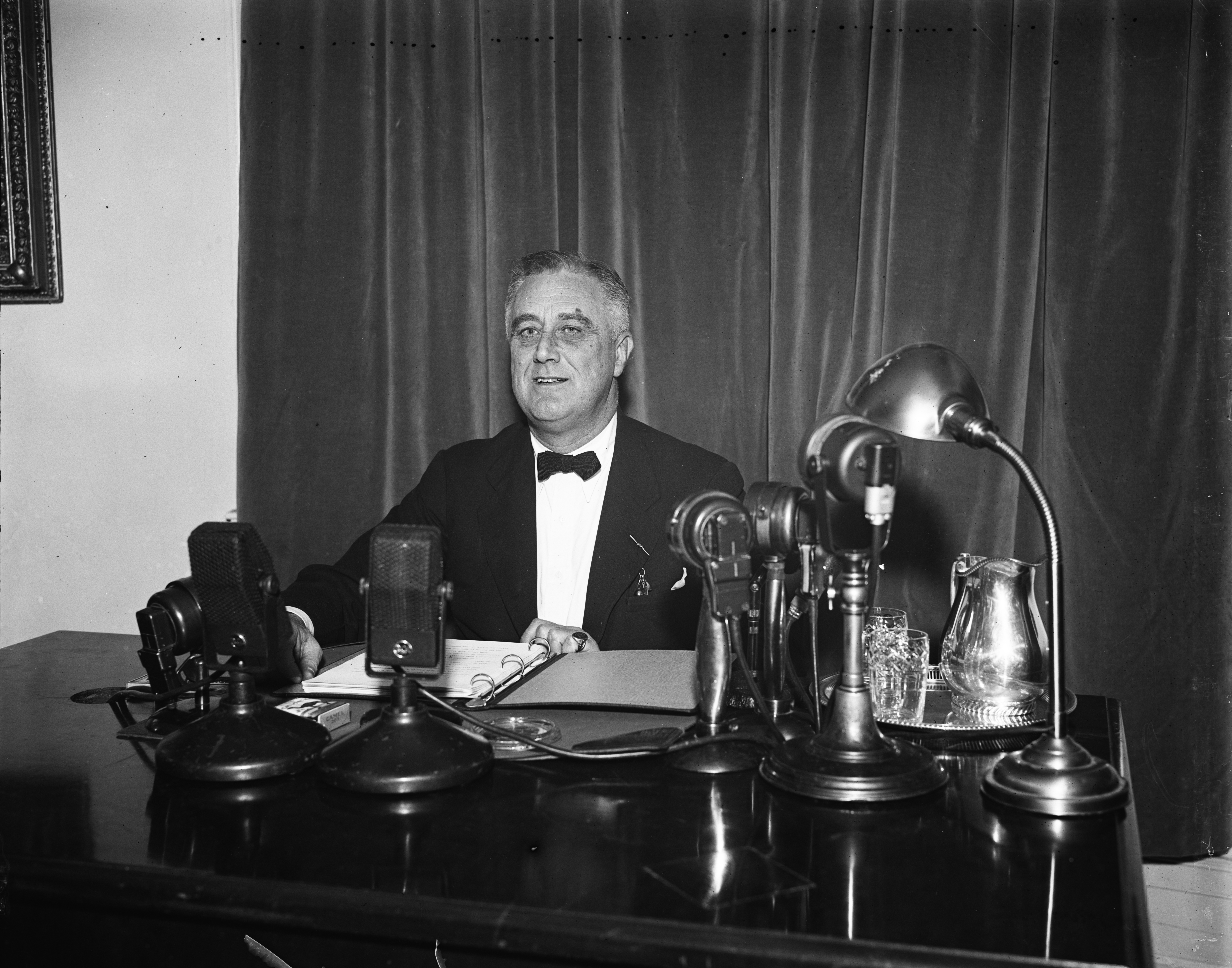 FDR (Franklin Delano Roosevelt) FIRESIDE CHAT ON U.S. SUPREME COURT REFORM PLAN